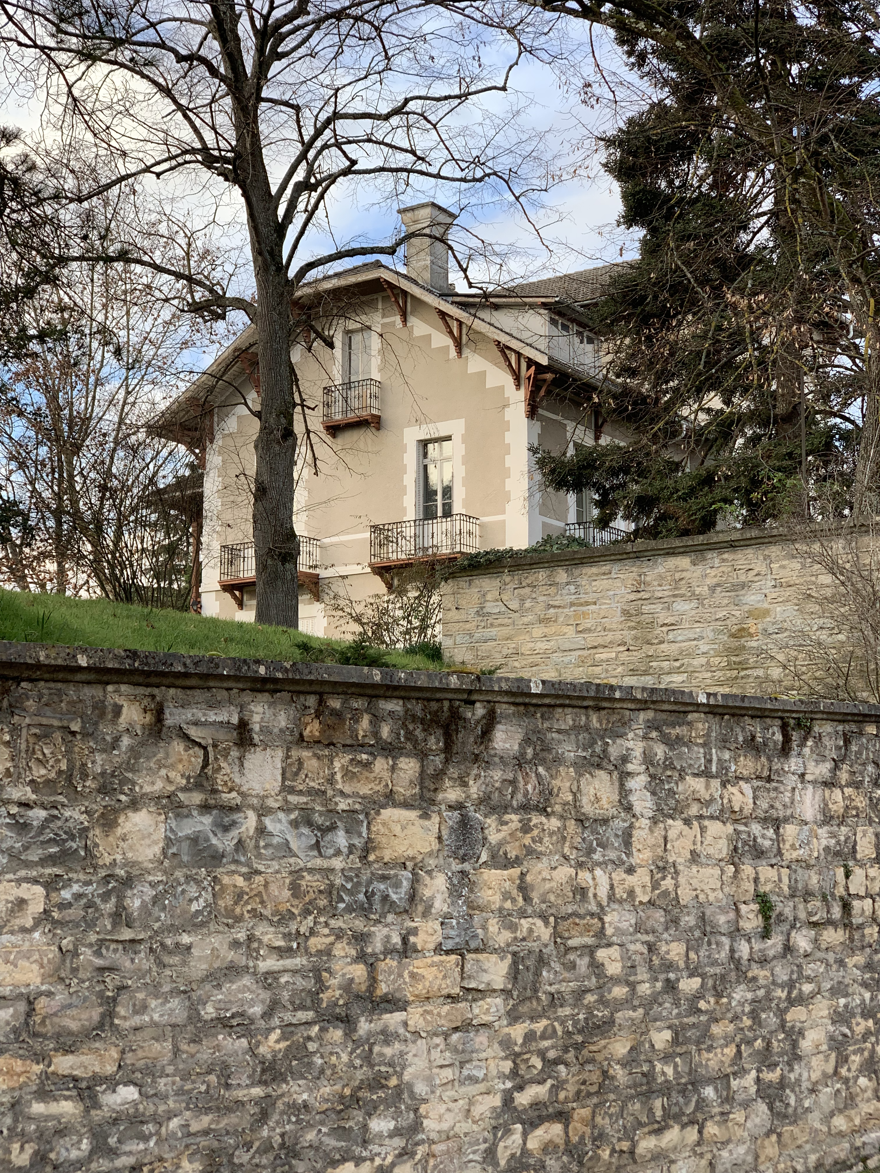 Chalet Joliette (Beynost) - vue depuis la rue du prieuré.